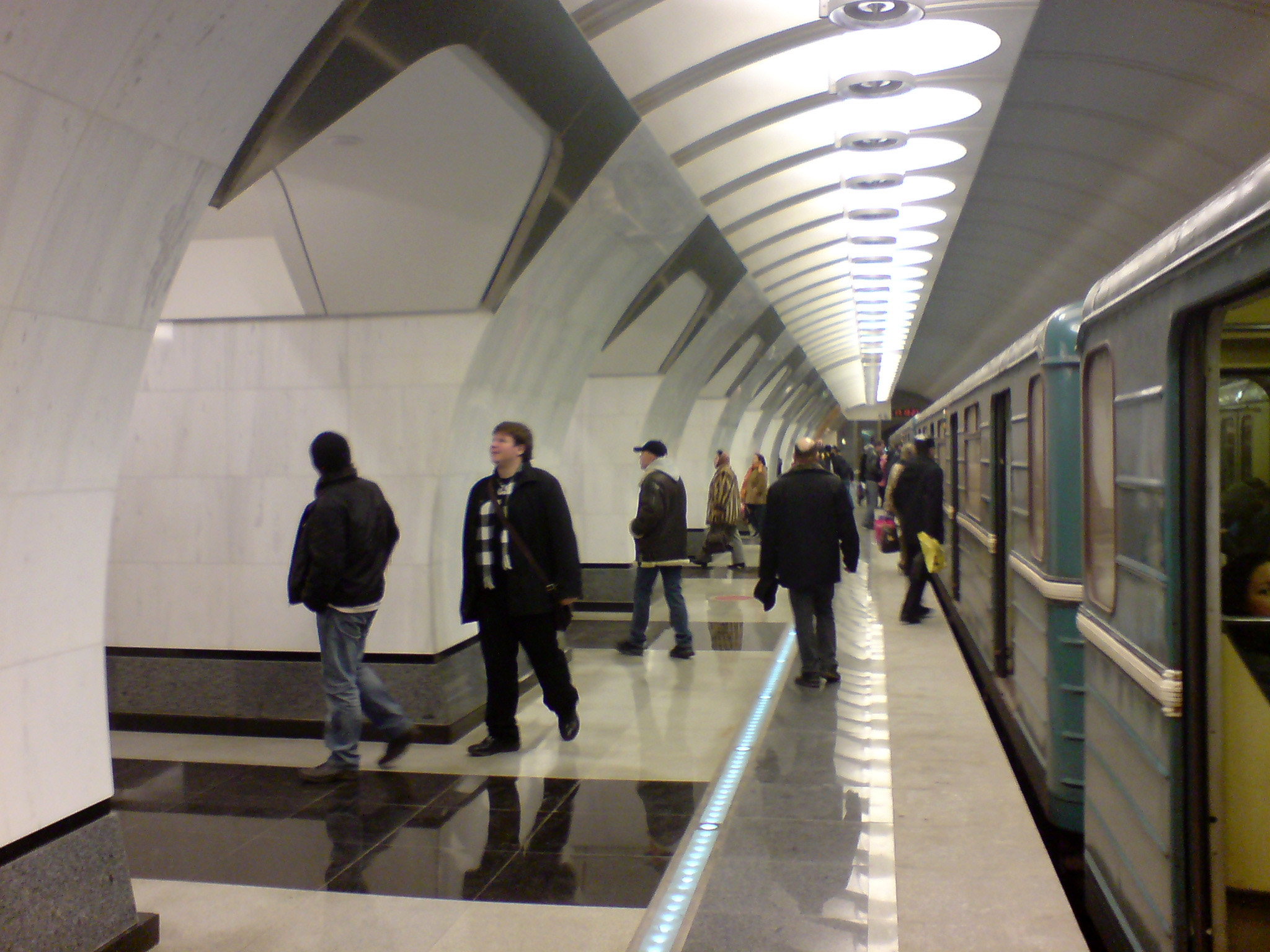 Sretensky Bulvar subway station